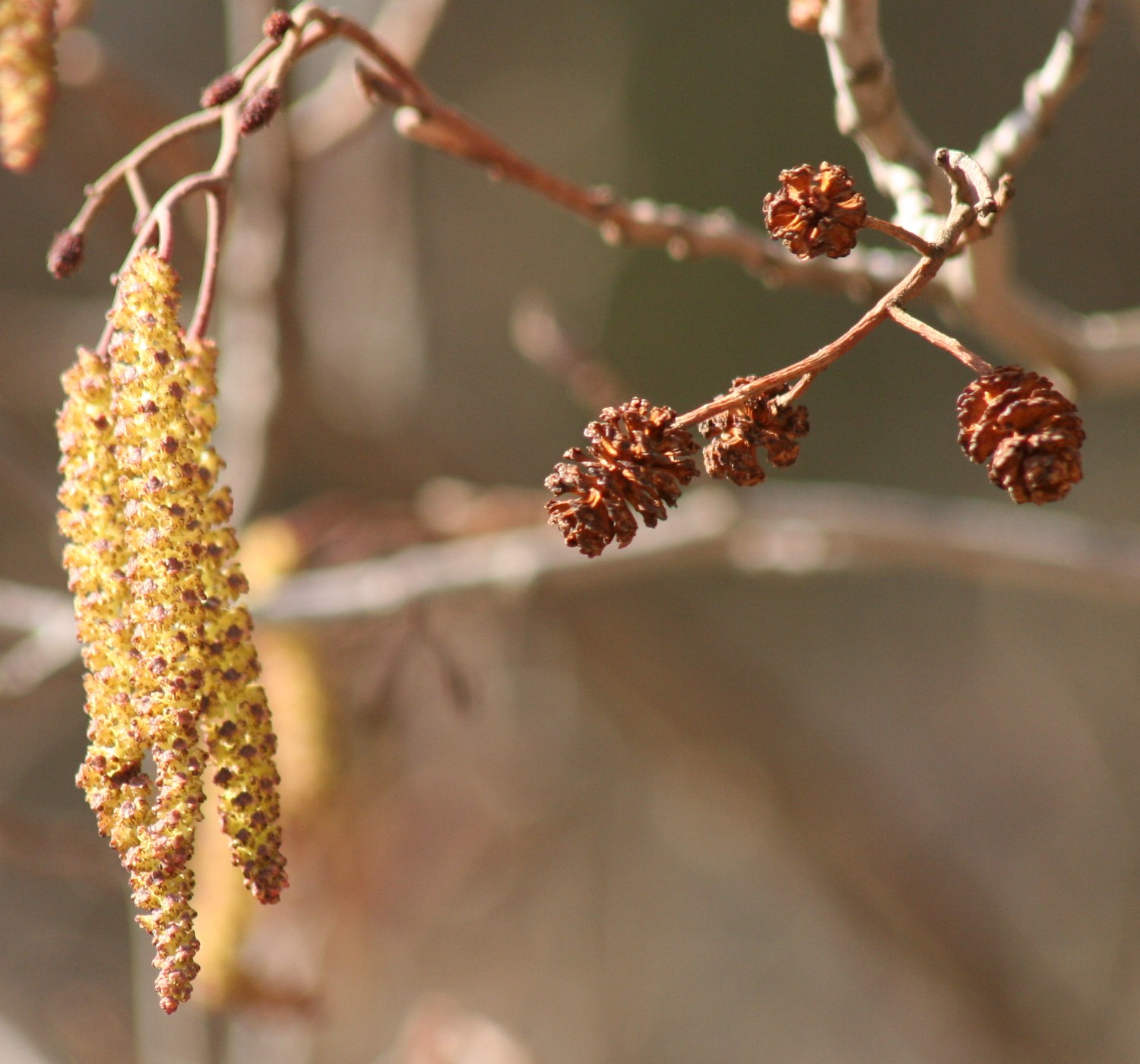 Hängen och kottar på en al (Alnus glutinosa) på våren. Foto: EnDumEn, 19 april 2006